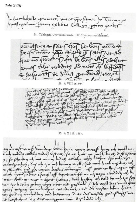 Schriftproben von Humanistenschrift, vor allem aus Basel. Ganz oben Autograph von Johannes Naukler